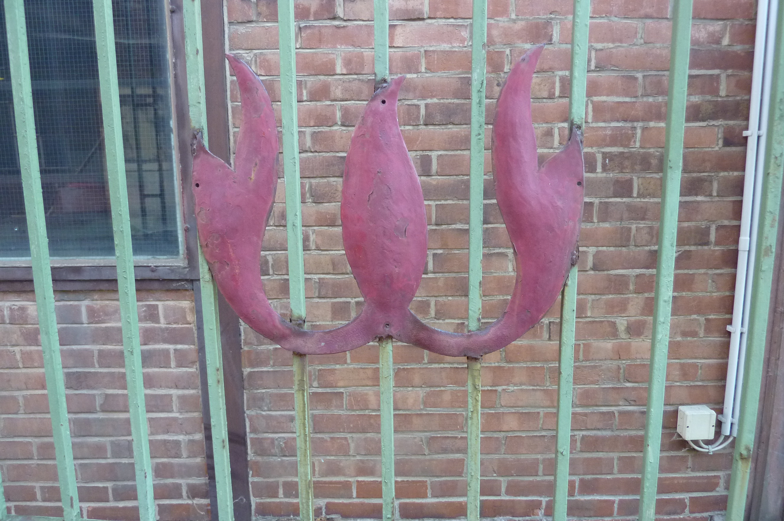 Das Logo der Firma Wilhelmshütte befindet sich am rechten Werkstor am Eingang